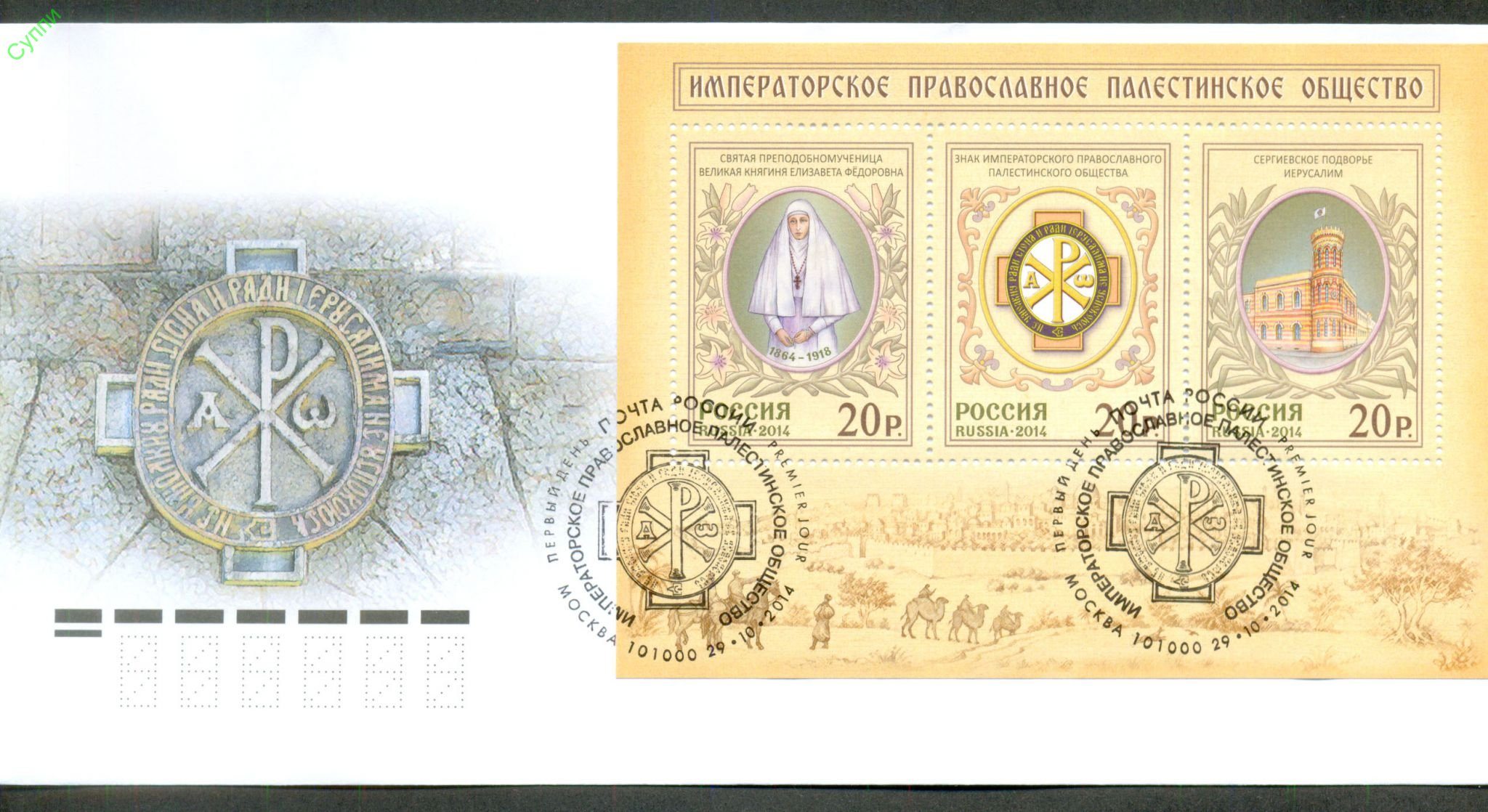 Императорское православное палестинское общество, почтовый конверт